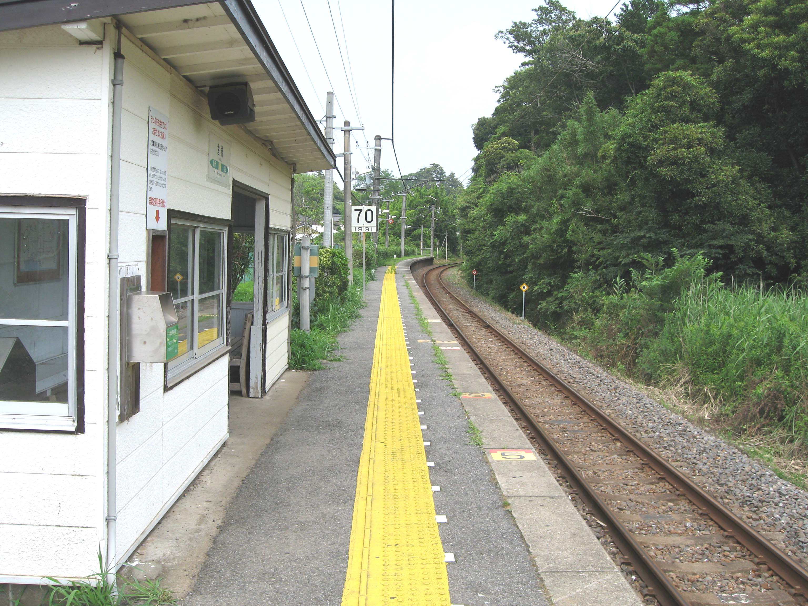 Kurahashi station, Soubu-Honsen Line, Chiba, Japan, 倉橋駅プラットホーム（銚子方面を望む）